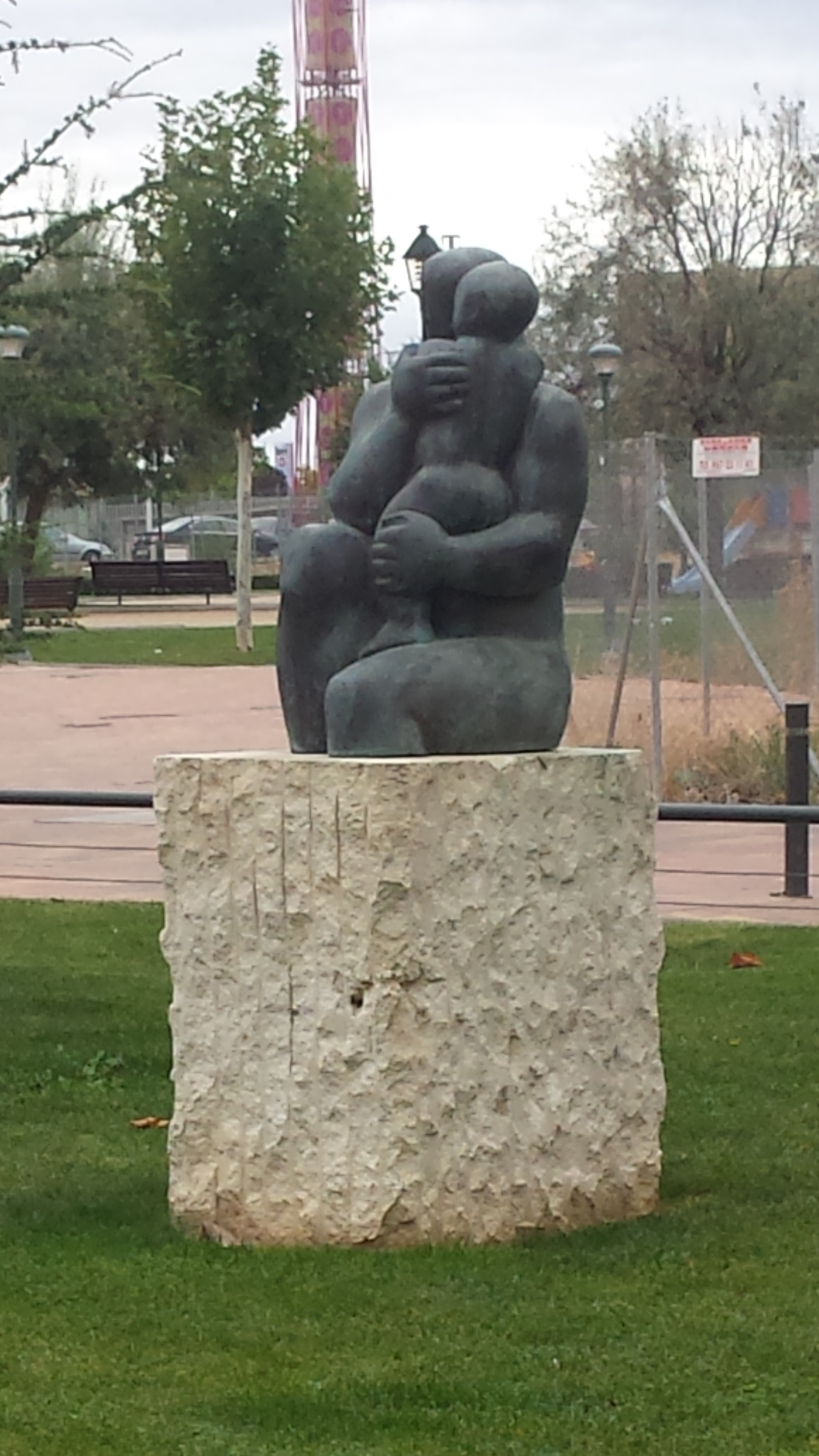 Maternidad. Circunvalación de Albacete